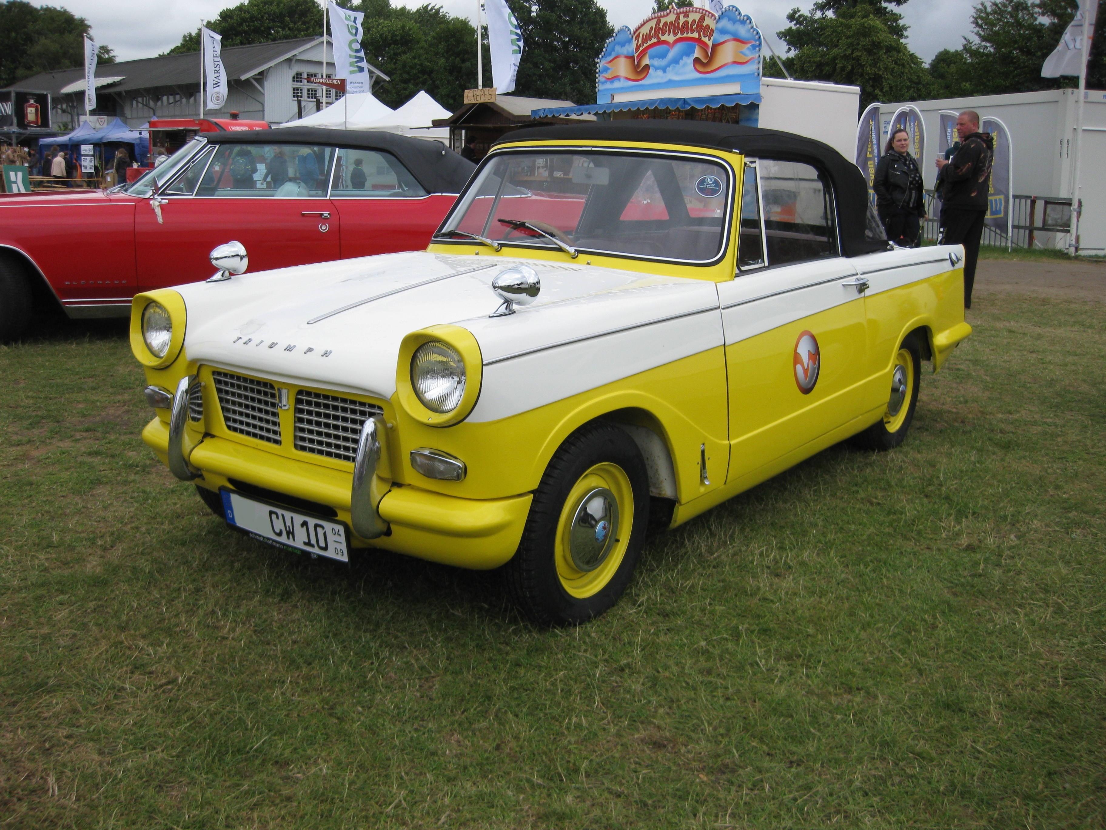 Triumph Herald Cabriolet